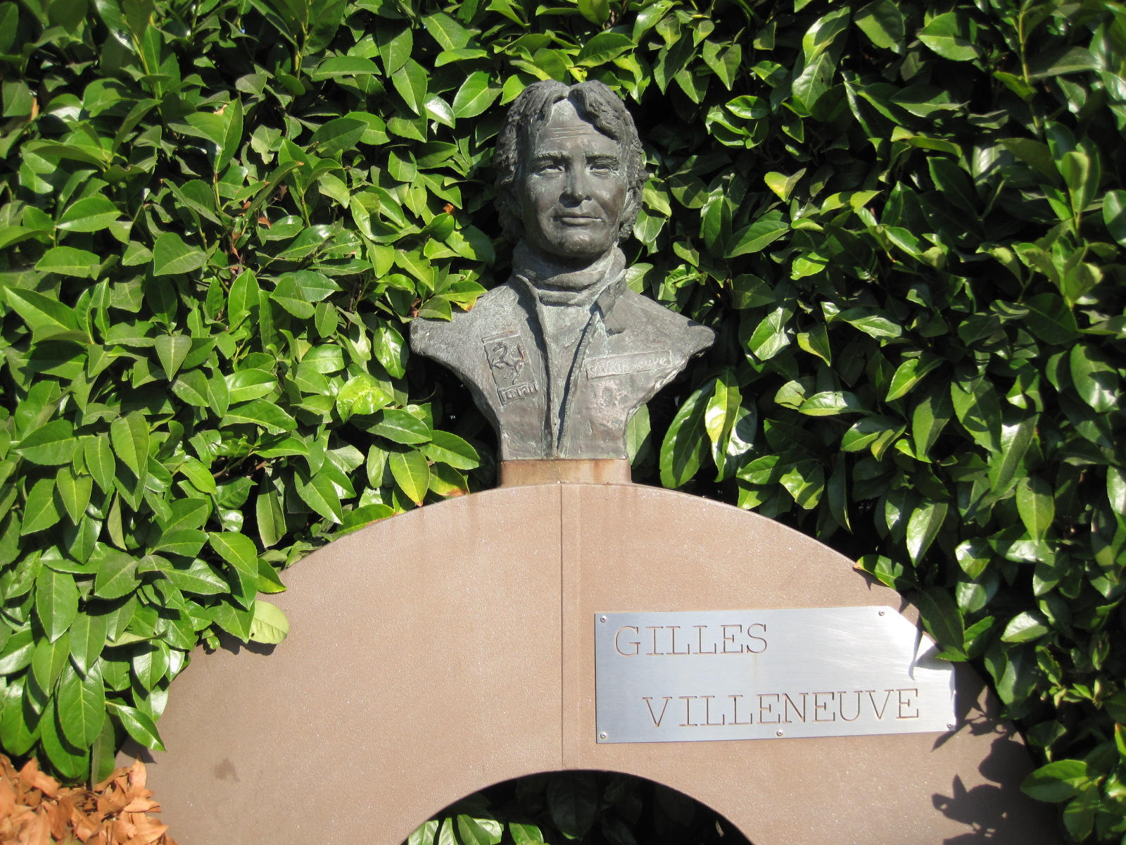 Circuit de Fiorano - Entrée